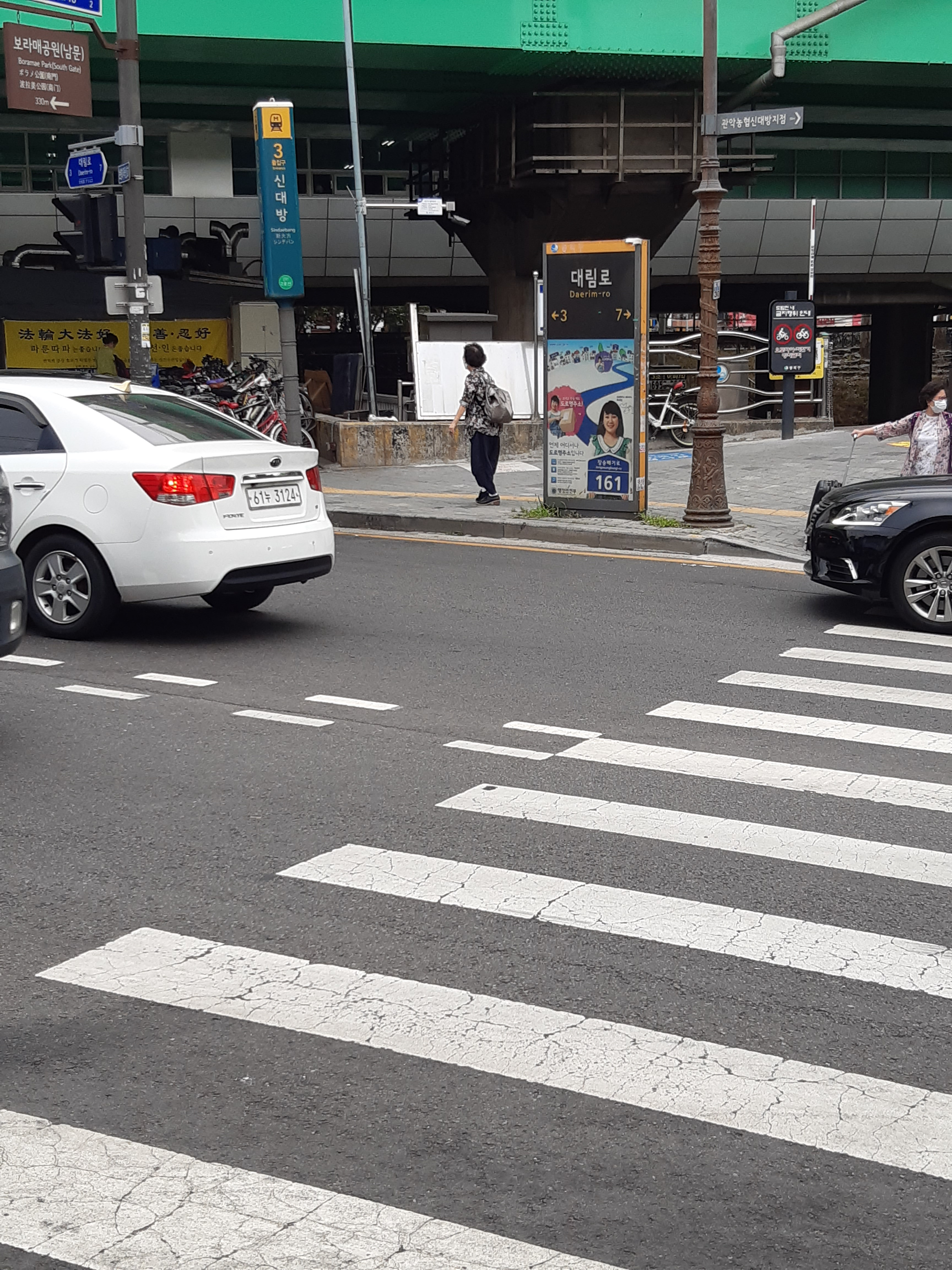 대림로(2호선 신대방역 3번 출구)